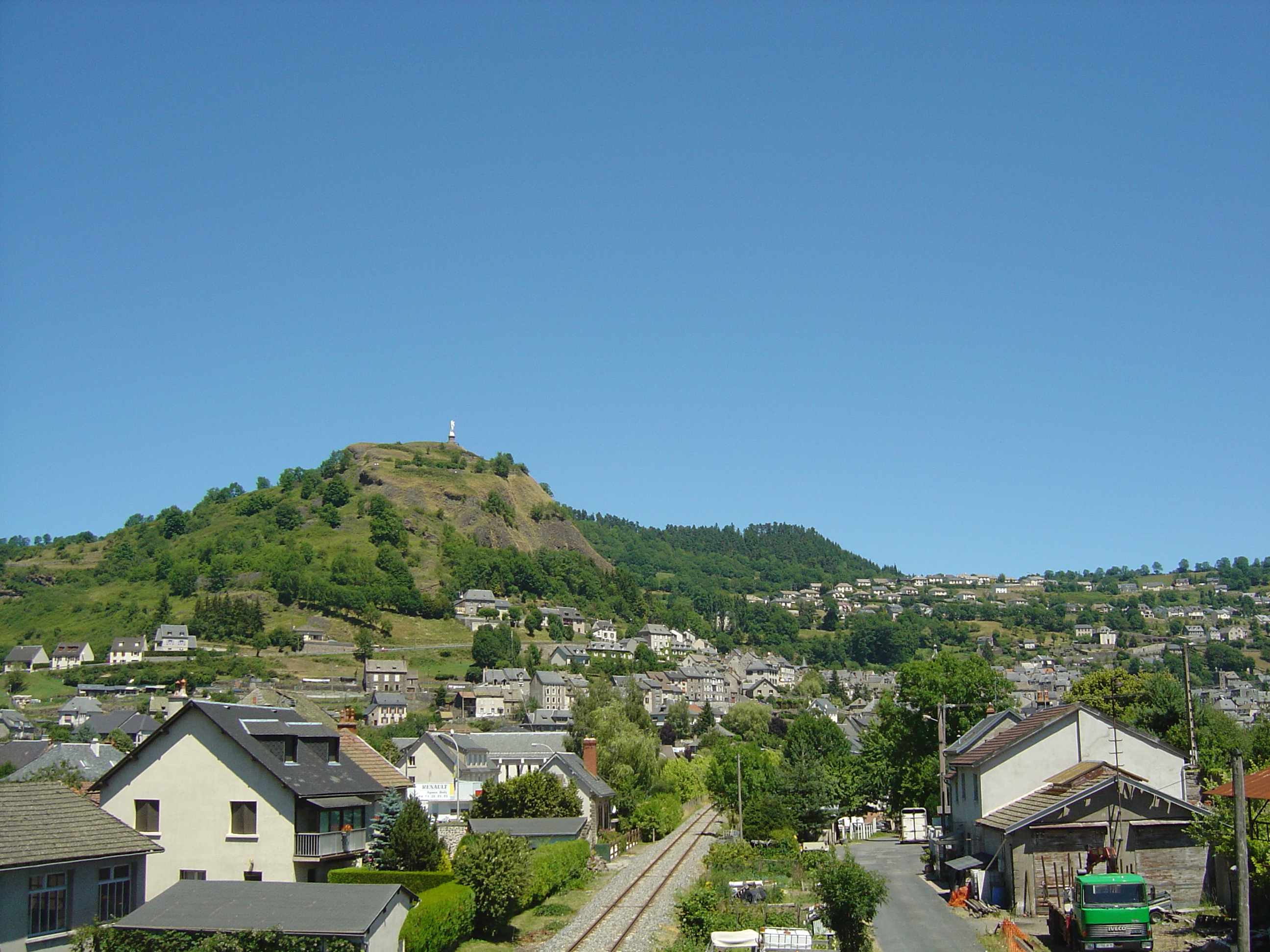 Murat, Super-Murat et le rocher de Bonnevie